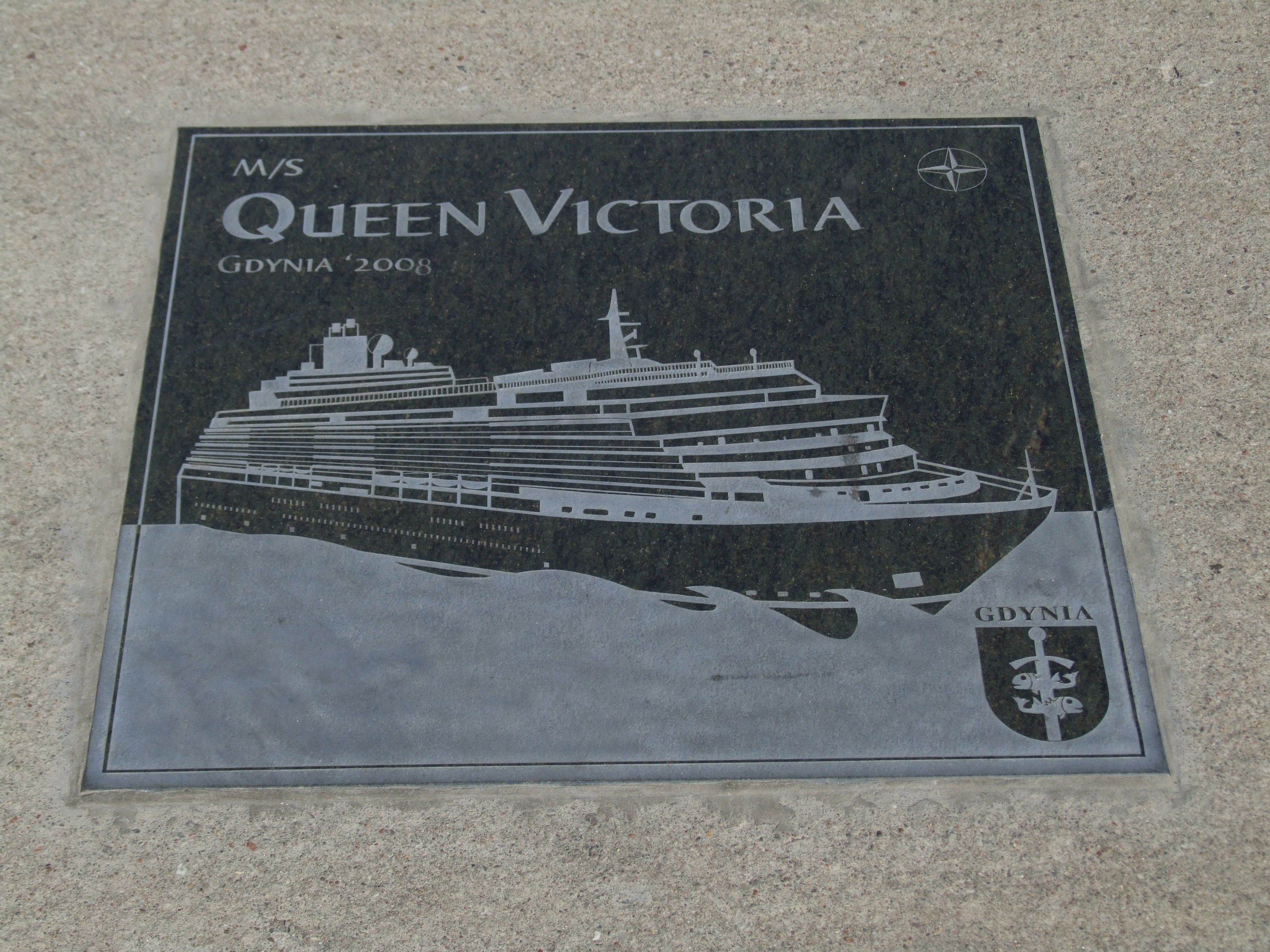 Aleja statków pasażerskich odwiedzających Gdynię, Gdynia